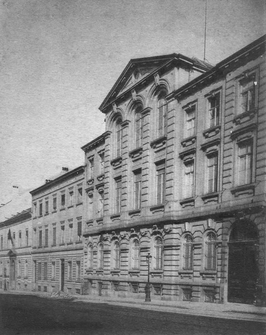 Convento y residencia de Berlaymont en Bruselas (rue de la loi) en 1904.